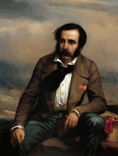 Dipinto del 1980